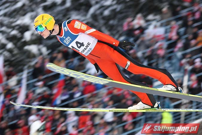 Puchar Świata w Zakopanem 2012/2013 – konkurs indywidualny (12 stycznia 2013)